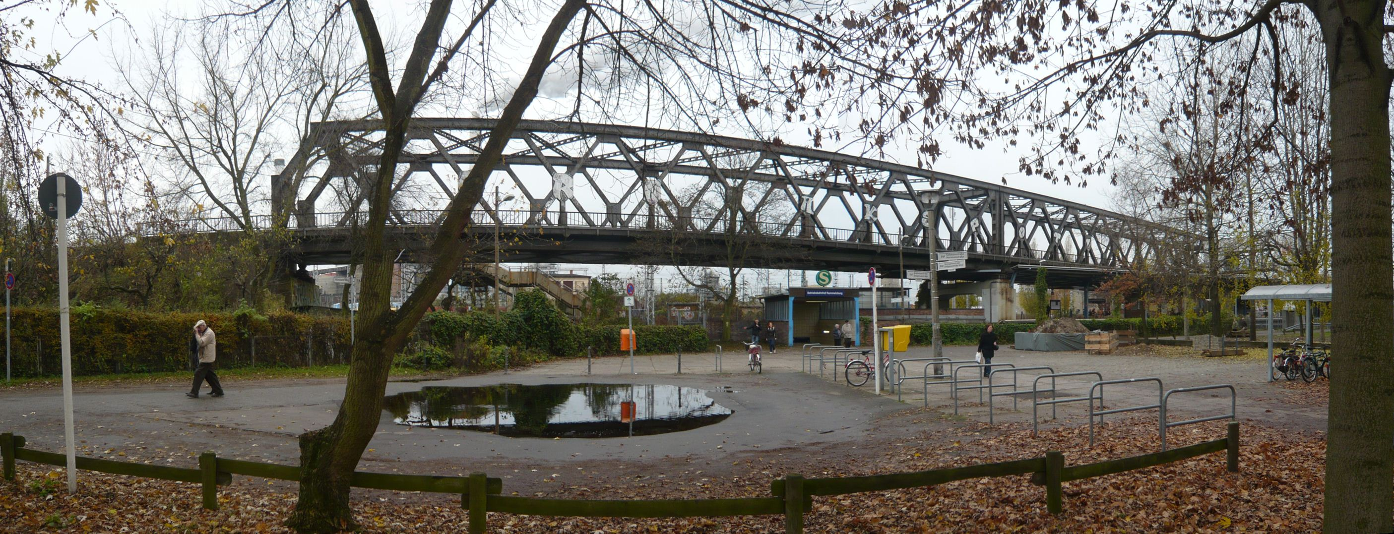 Blick auf die S-Bahn-Station Betriebsbahnhof Rummelsburg